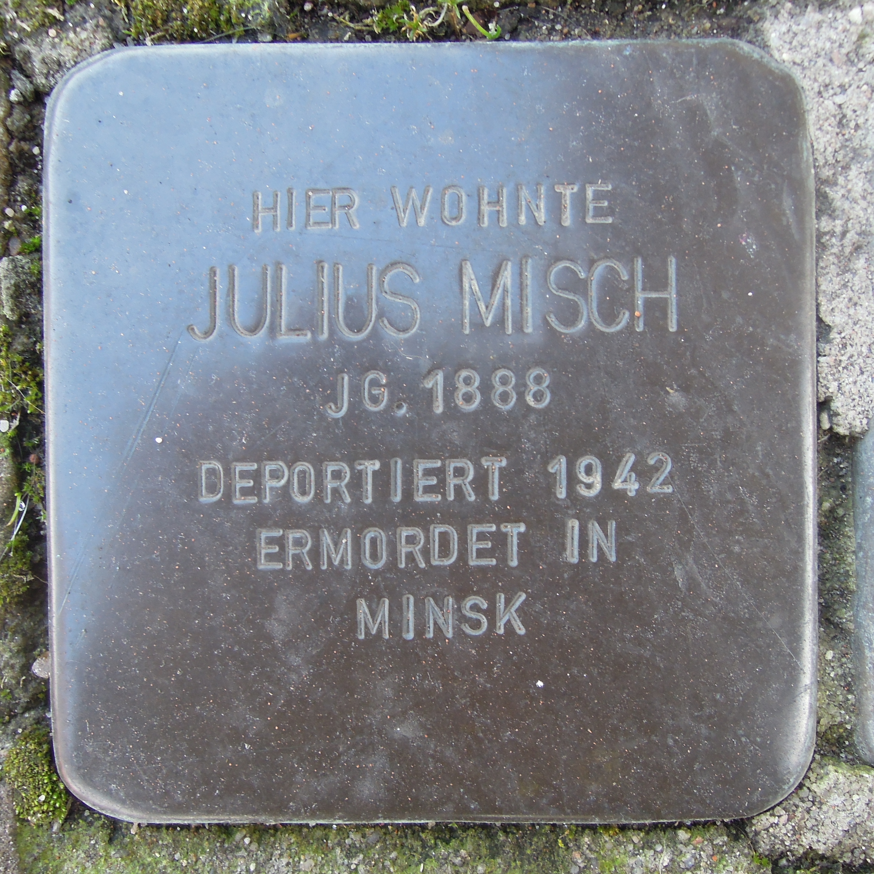 Stolperstein Alpen Bruckstraße 20 Julius Misch